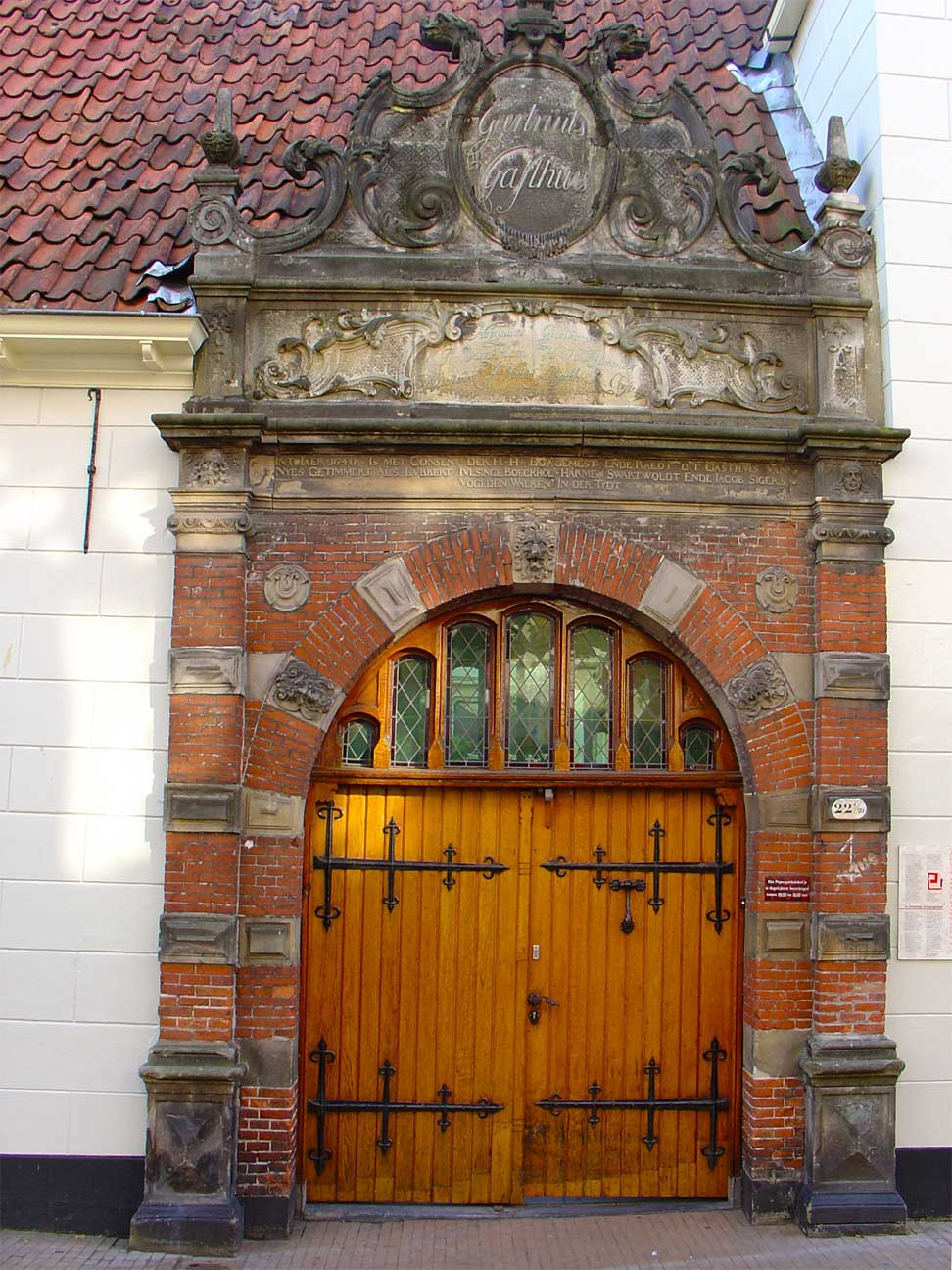 Het Peper- of Geertruitsgasthuis te Groningen